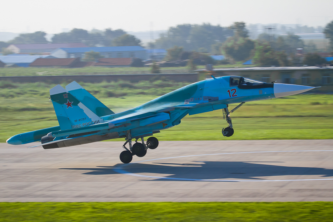 Зачетные полеты участников конкурса «Авиадартс» (п. Чанчунь, КНР)